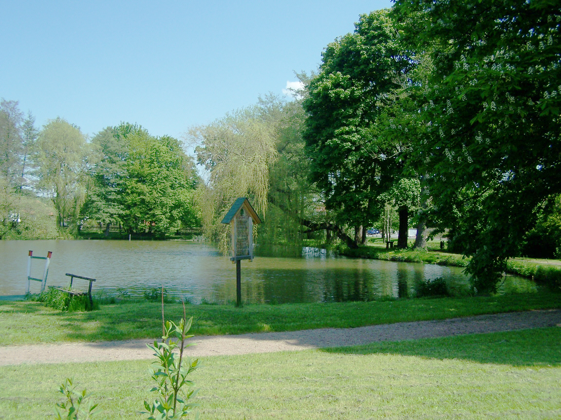 Madelungen